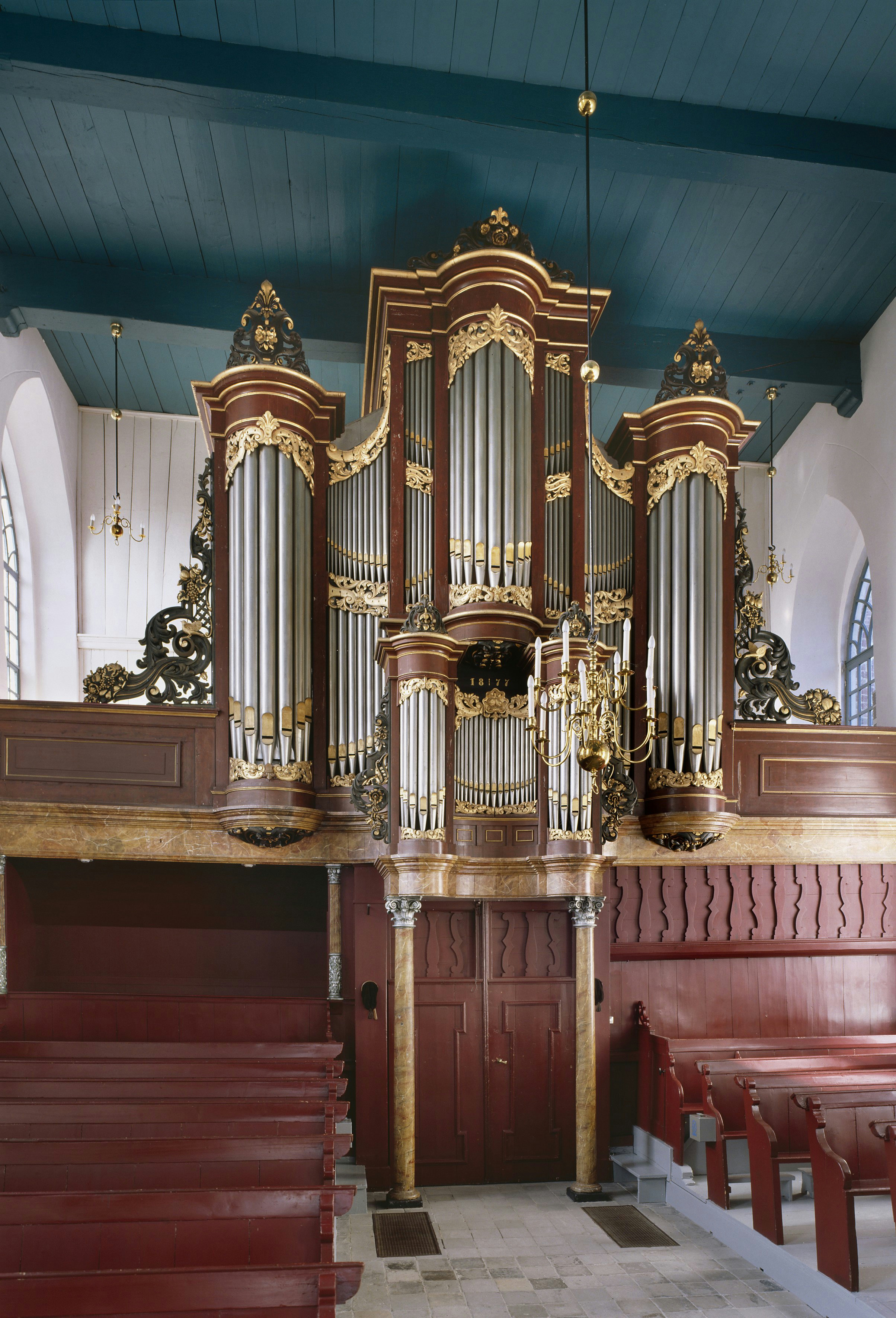 Nederlands Hervormde Kerk: Intenieur, aanzicht orgel, orgelnummer 251 (opmerking: Gefotografeerd voor Het Historische Orgel in Nederland 1872-1878, bladzijde 322)